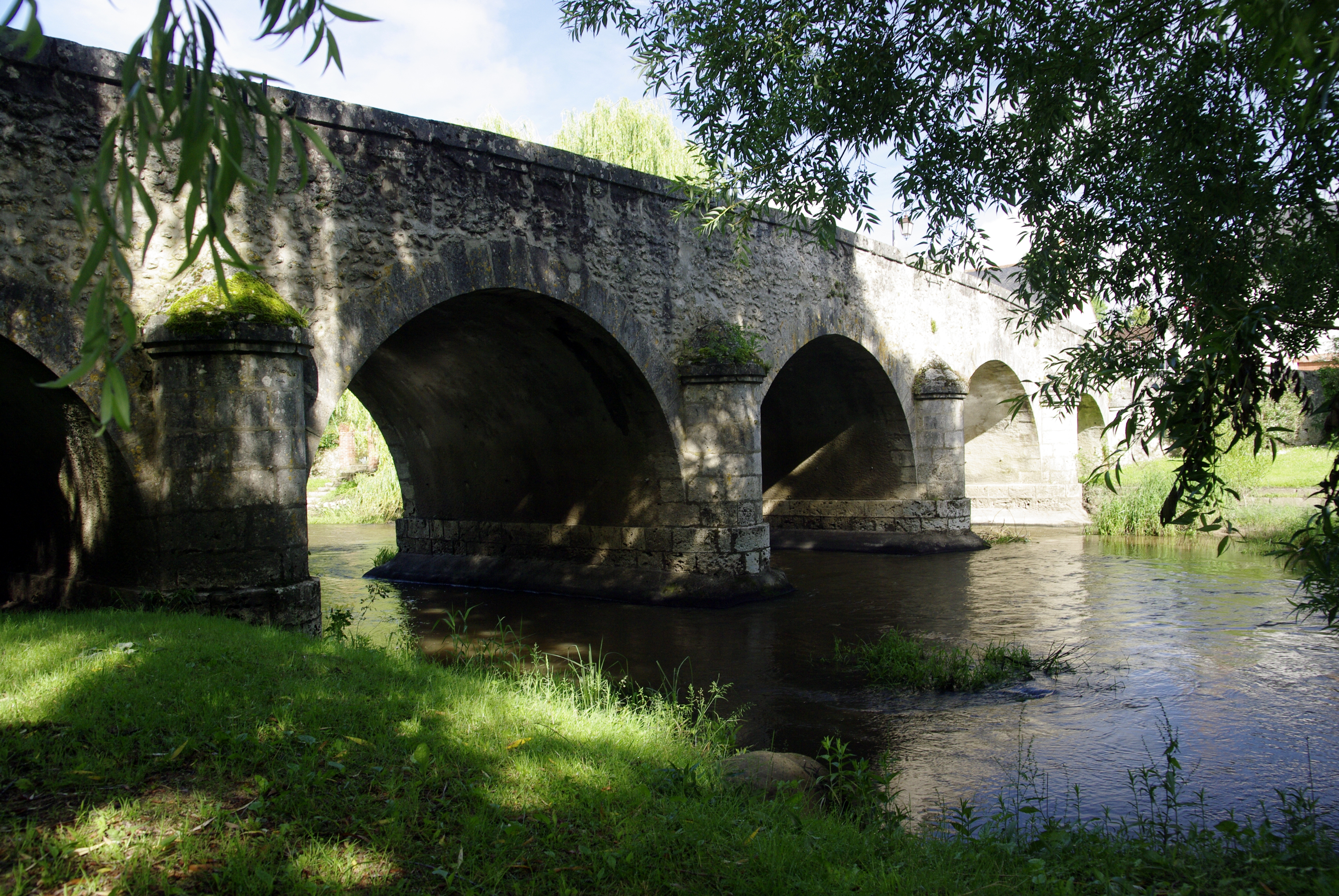 Le pont sur la rivière Cosson, à Huisseau-sur-Cosson, Loir-et-Cher.